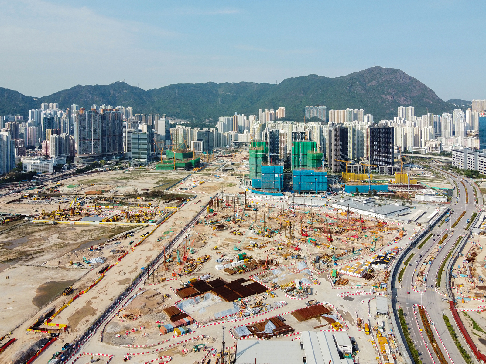 Kai Tak Development Overview